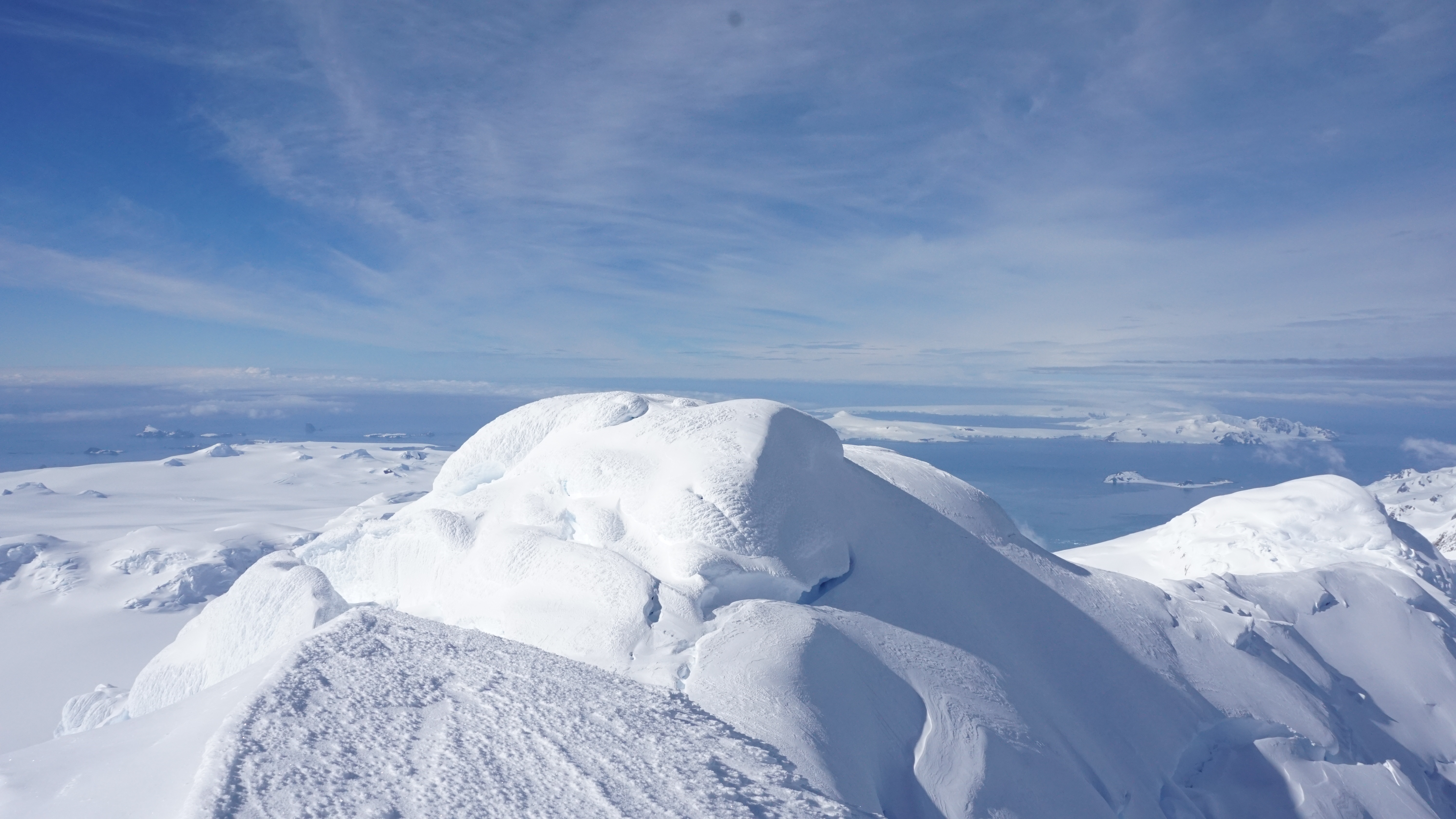 Поглед от връх Св. Борис към връх Фризланд